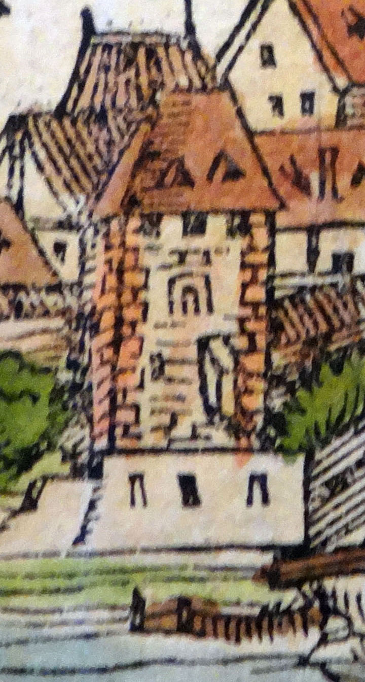 Kropsort, Worms. Detail aus: Sebastian Münster: Cosmographey. Hencicpetrina, Basel 1572, S. DCXCIII–DCXCVI. Stadtarchiv Worms: Abt. 217 Nr. 1478.